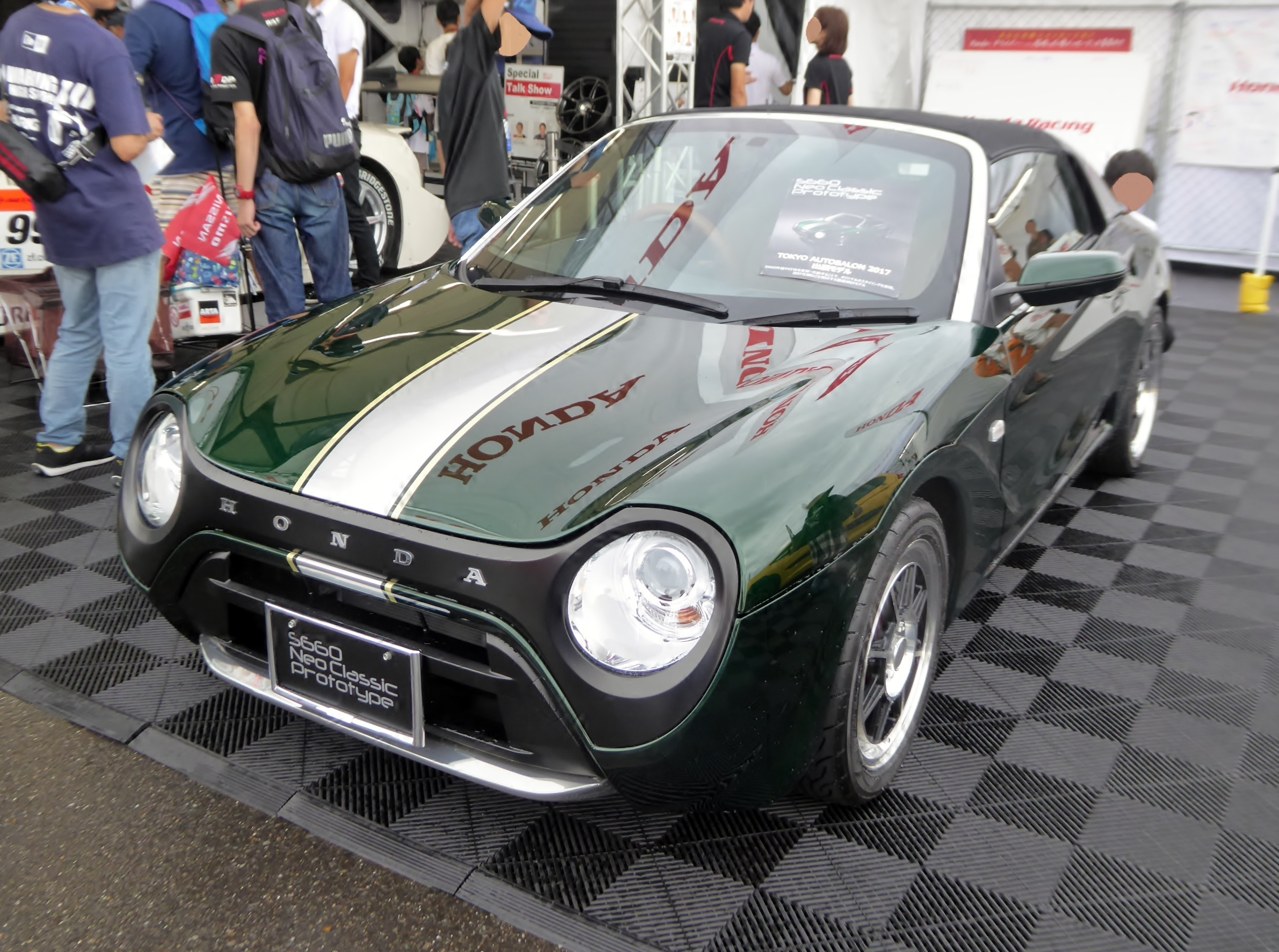 ホンダ・S660ネオクラシックプロトタイプをフロントから撮影。